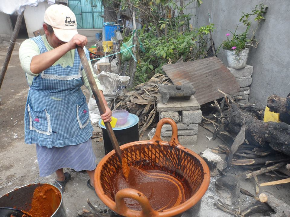 El Mole Poblano es, entre otros, el platillo mestizo y tradicional más representativo de las fiestas del pueblo y, a su vez, es el platillo principal que se disfruta con toda su gran variedad de ingredientes vertido sobre las piezas de guajolote y acompañado con arroz y tortillas de maíz. Platillo típico en el que converge tanta historia.